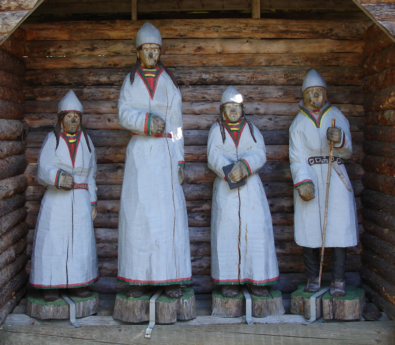 Minnesmärket över Stor-Stina, "Långa lappflickan" utanför Brännäs i Malå kommun.